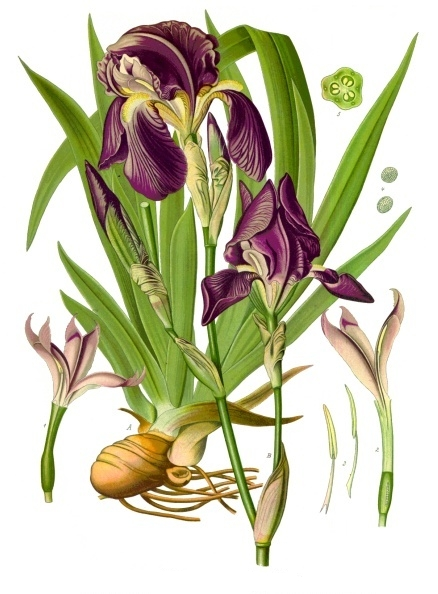 Deutsche Schwertlilie. A B Theile der Pflanze in natürl. Grösse; 1 Blüthe ohne Kronenabschnitte (Kronenröhre), mit den 3 Narben, desgl.; 2 dieselbe mit dem Fruchtknoten im Längsschnitt, desgl.; 3 Staubgefäss, vergrössert; 4 Pollen, desgl.; 5 Fruchtknoten im Querschnitt, desgl.